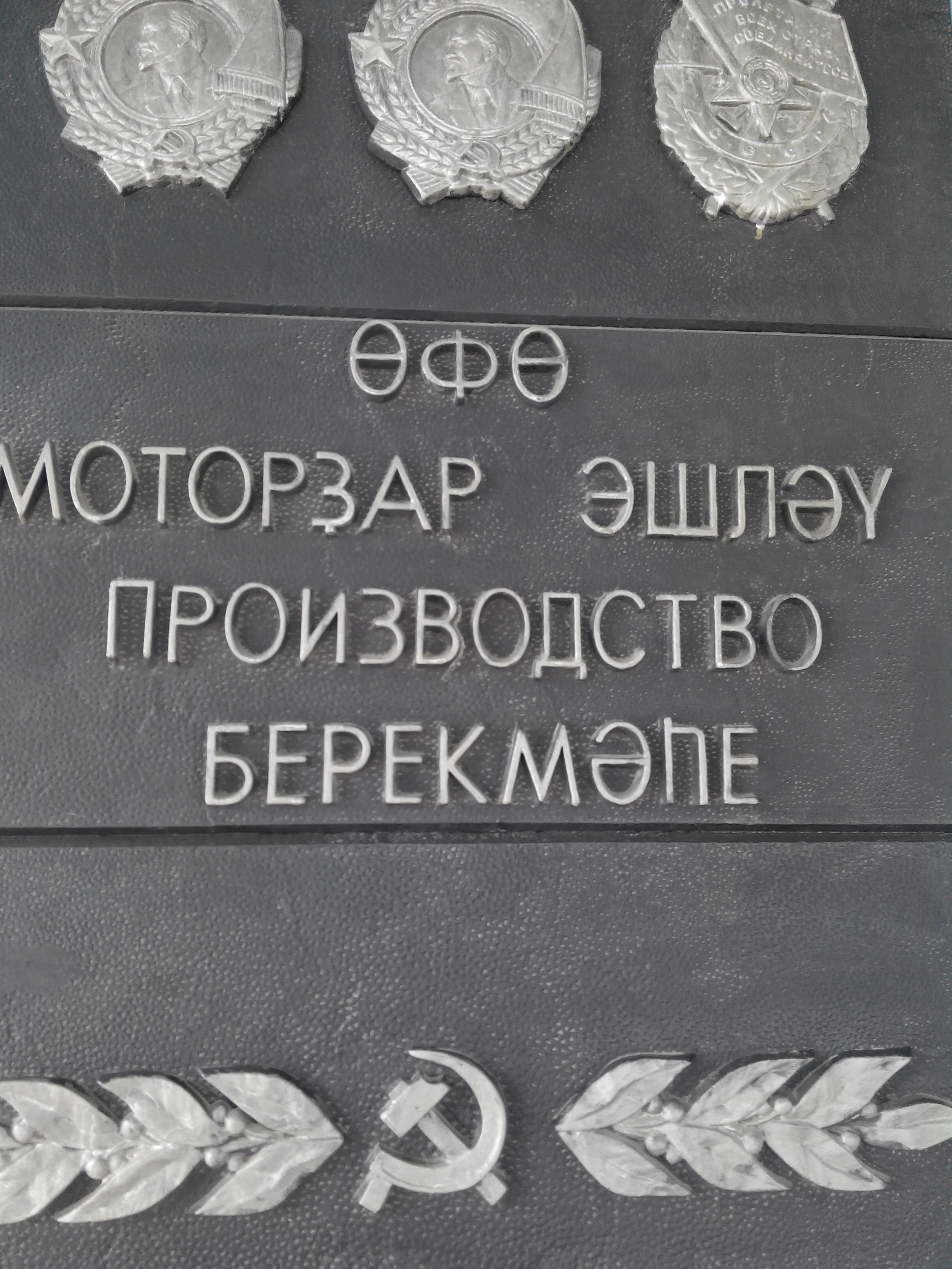 Башҡортса: Өфө моторҙар эшләү производство берекмәһе